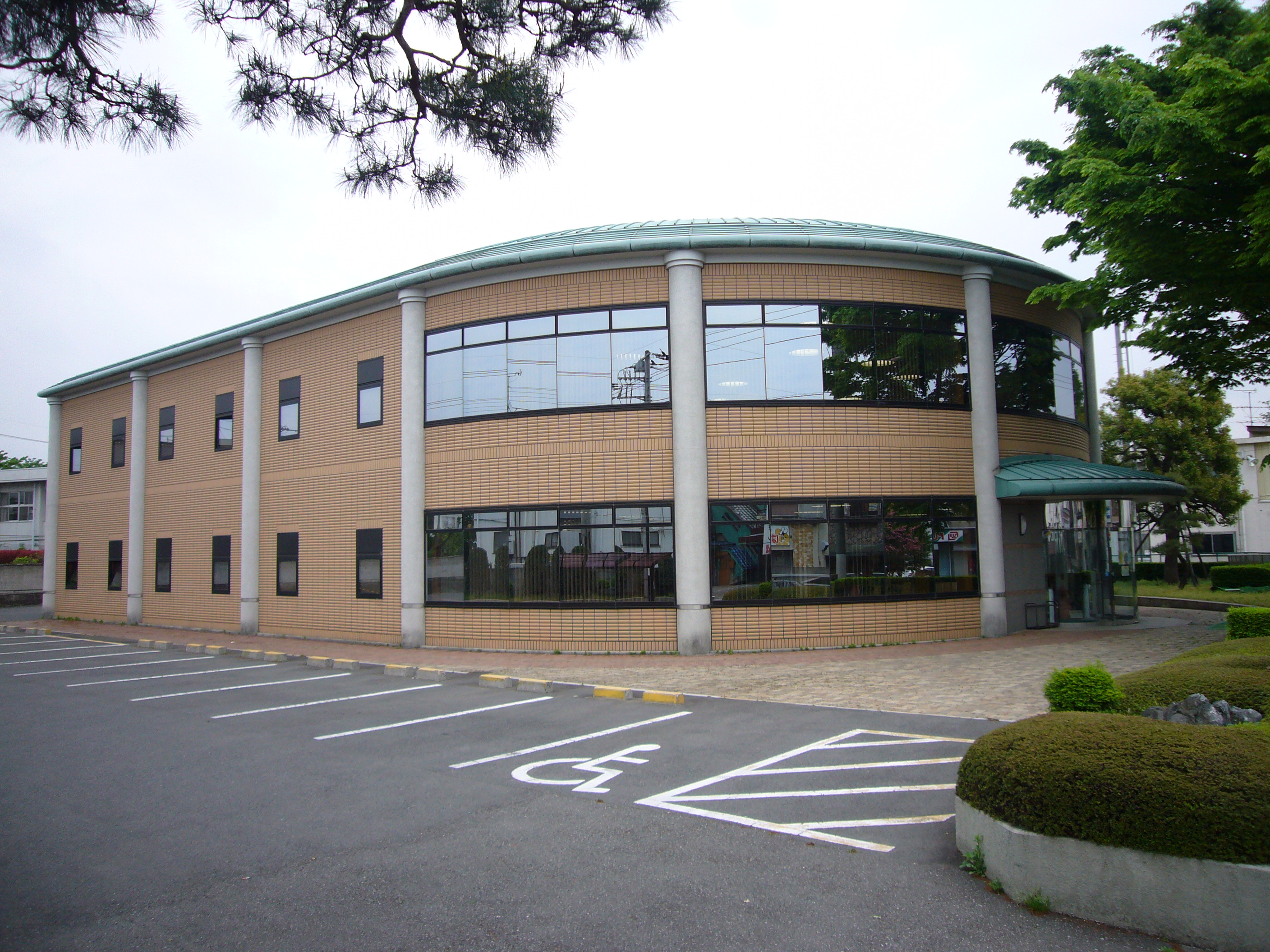 群馬図書館の外観